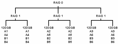 Dit is een afbeelding met een verduidelijking van RAID10, de afbeelding is gebaseerd op de 'ASCII'-afbeelding die te zien is op